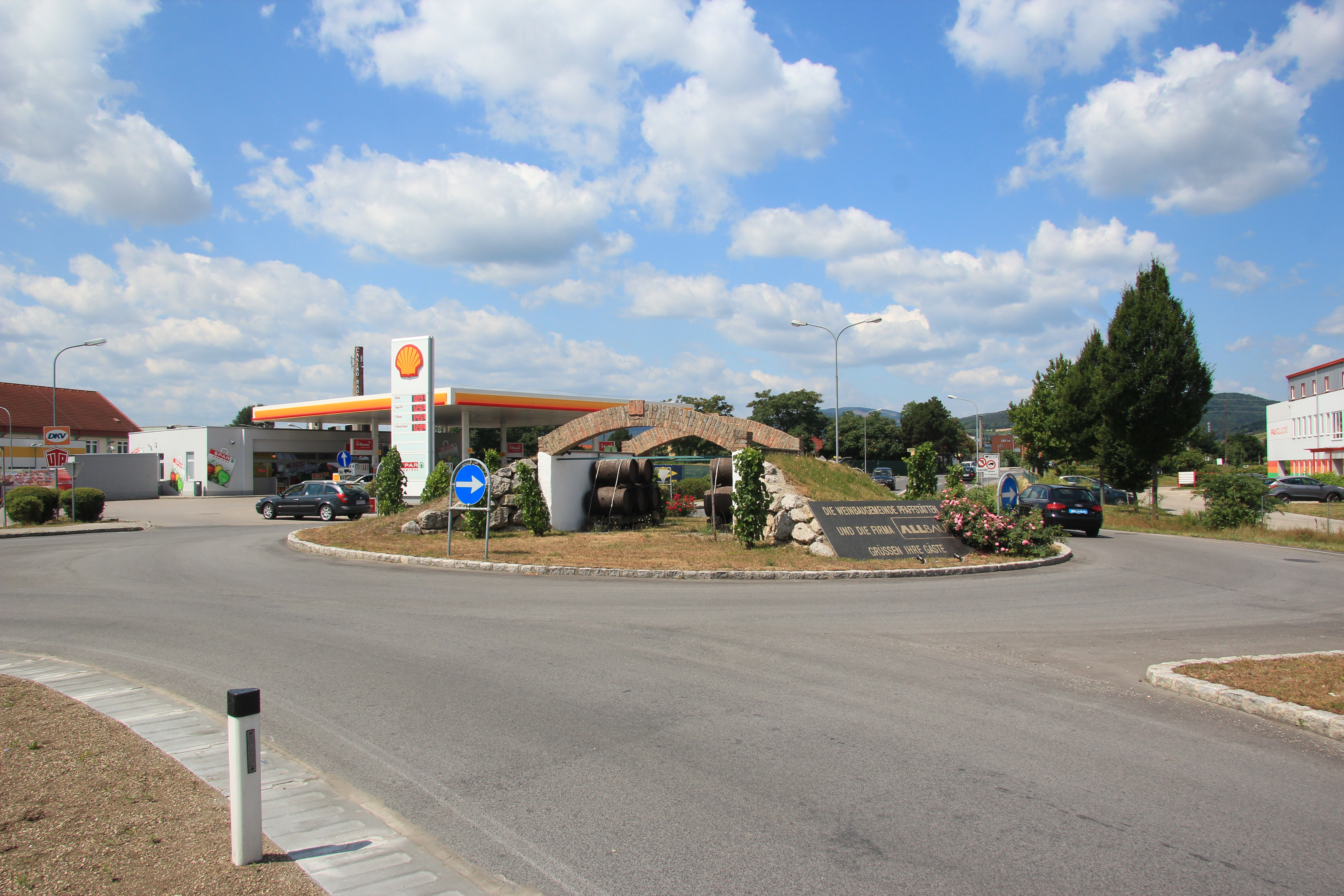 Kreisverkehr bei der Ortseinfahrt von Pfaffstätten an der B212